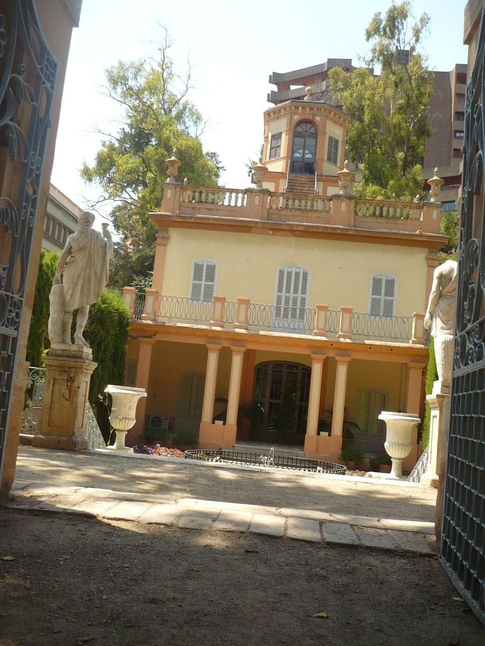 Jardin Monforte de Valencia.